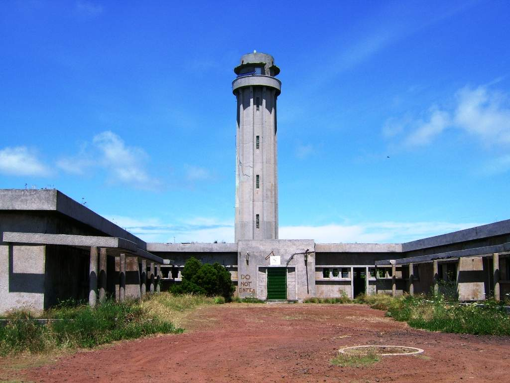 Farol dos Rosais, Ponta dos Rosais, ilha de São Jorge, Açores, Portugal